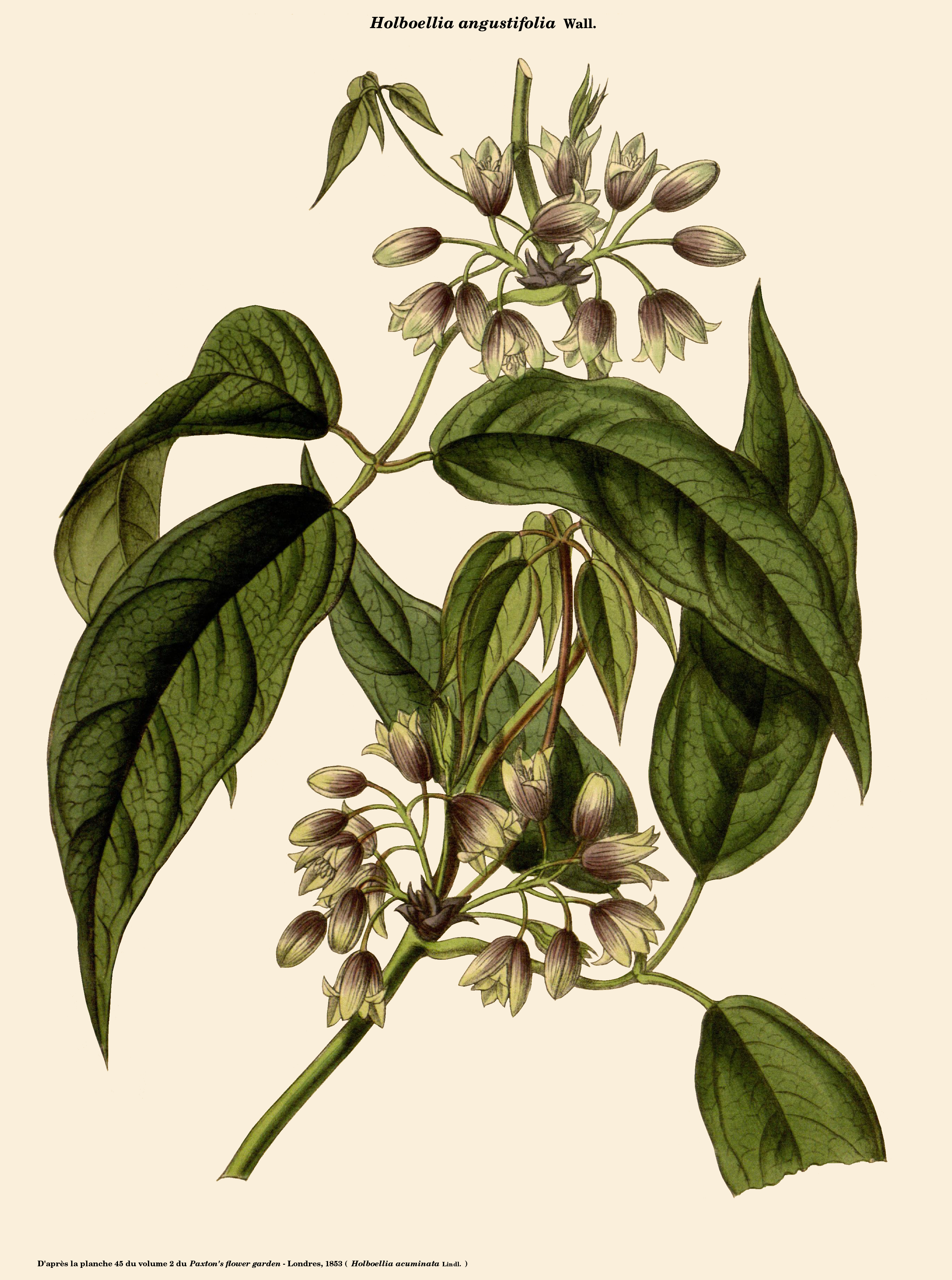 Holboellia angustifolia - D'après la planche 45 du Paxton's flower garden - Londres, 1853 (Holboellia acuminata) reprise sous GIMP.